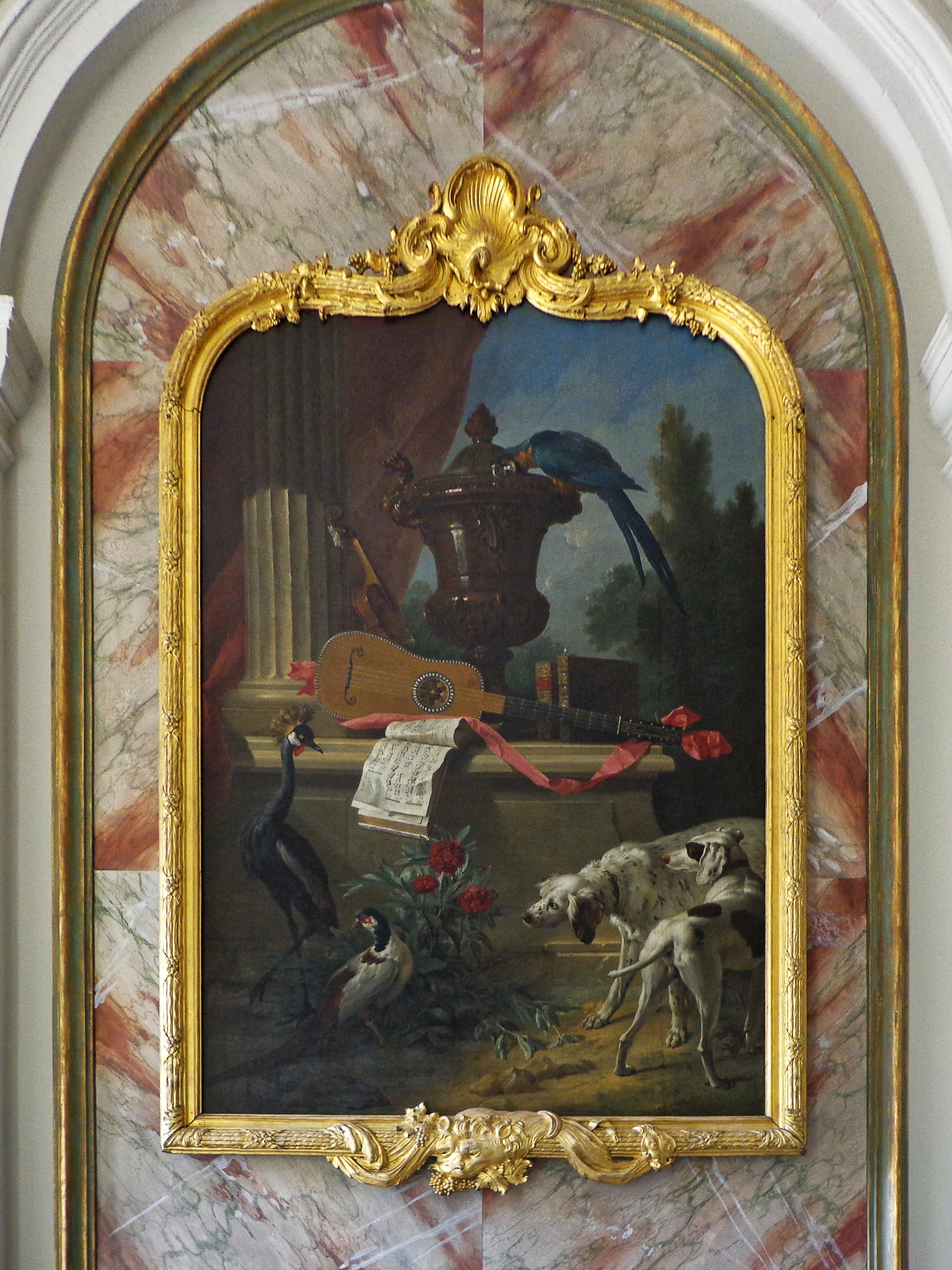 Oeuvre de Jean-Baptiste Oudry datée de 1742